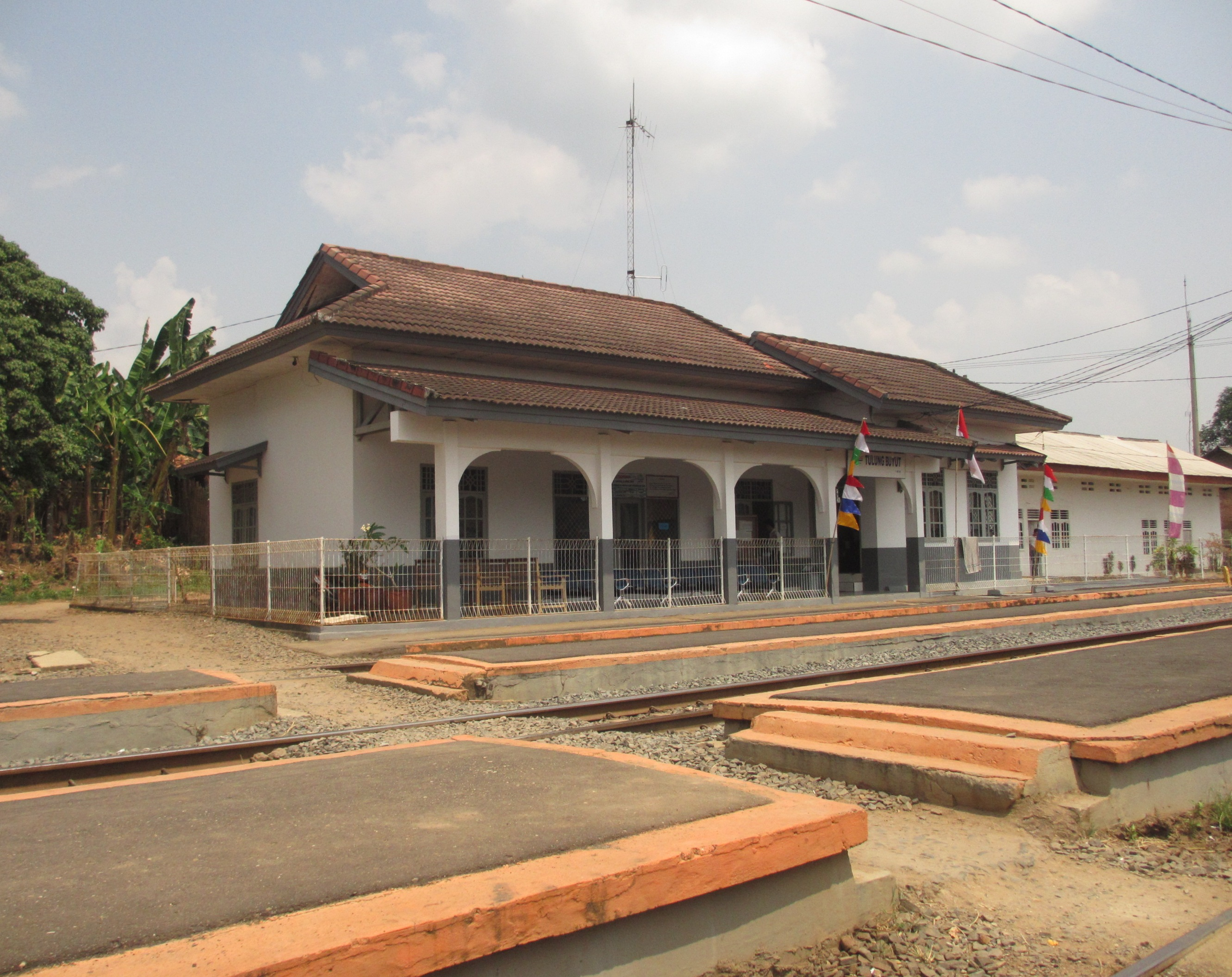 Stasiun Tulungbuyut.